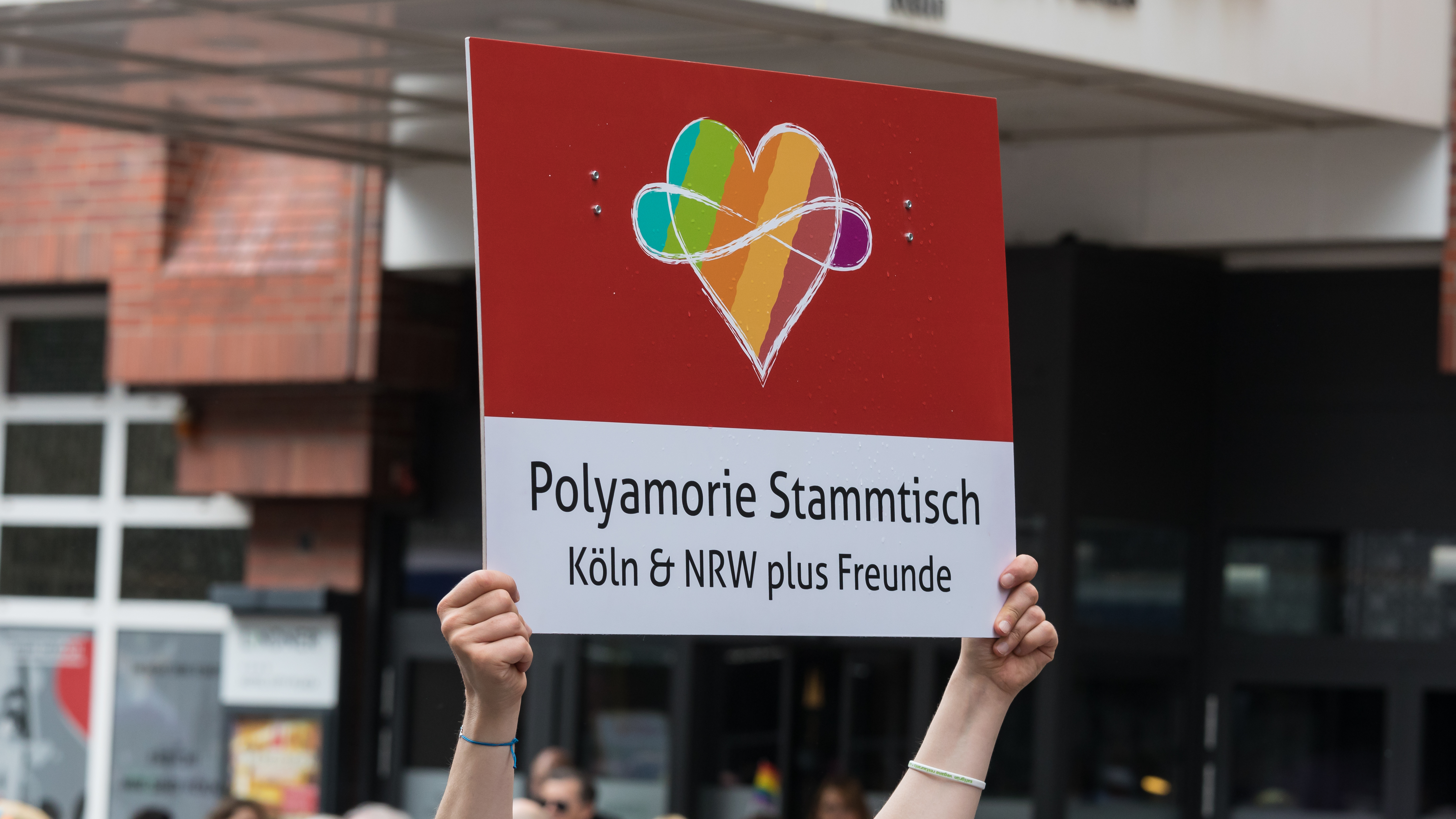 ColognePride - CSD-Parade